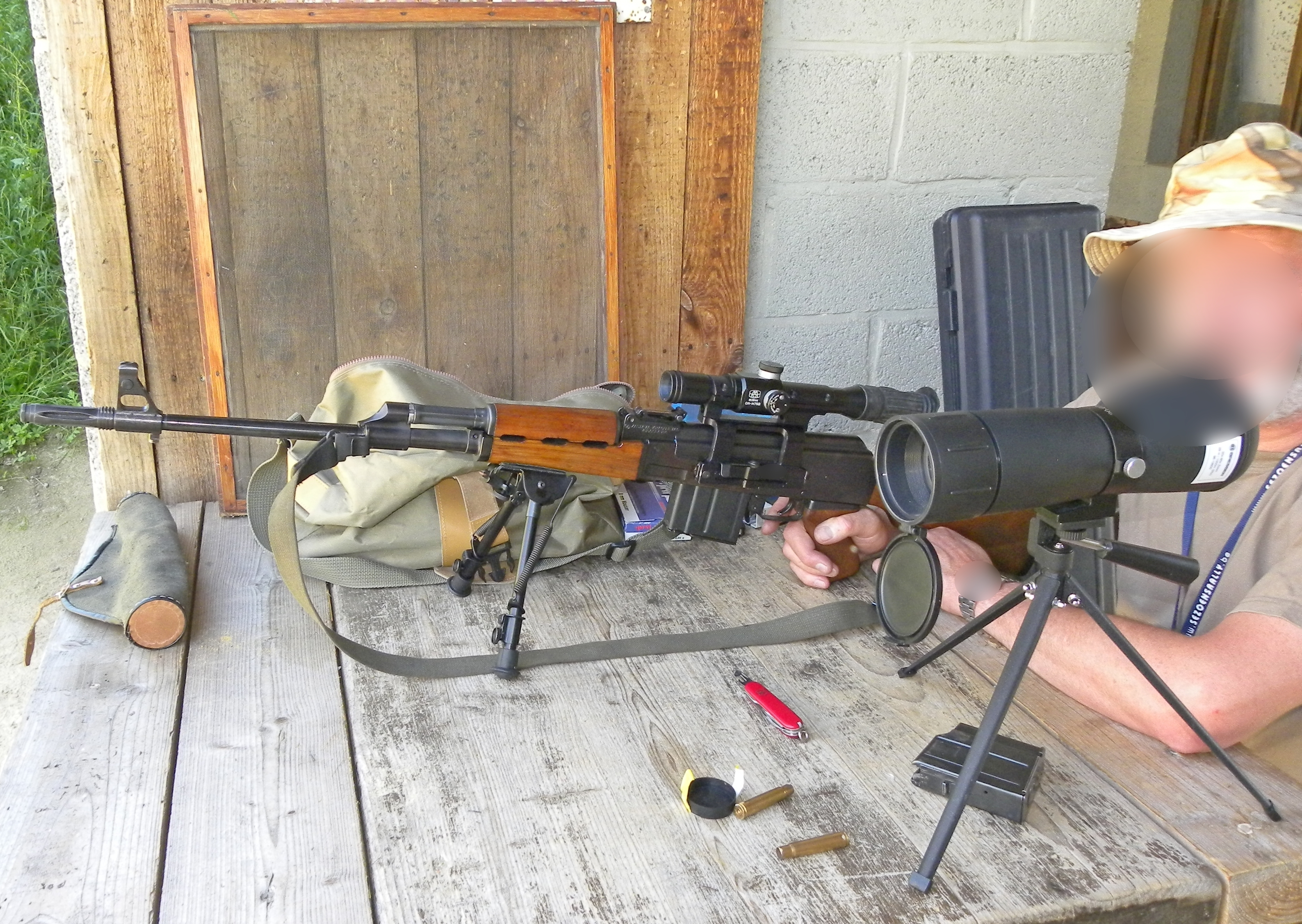 zastava